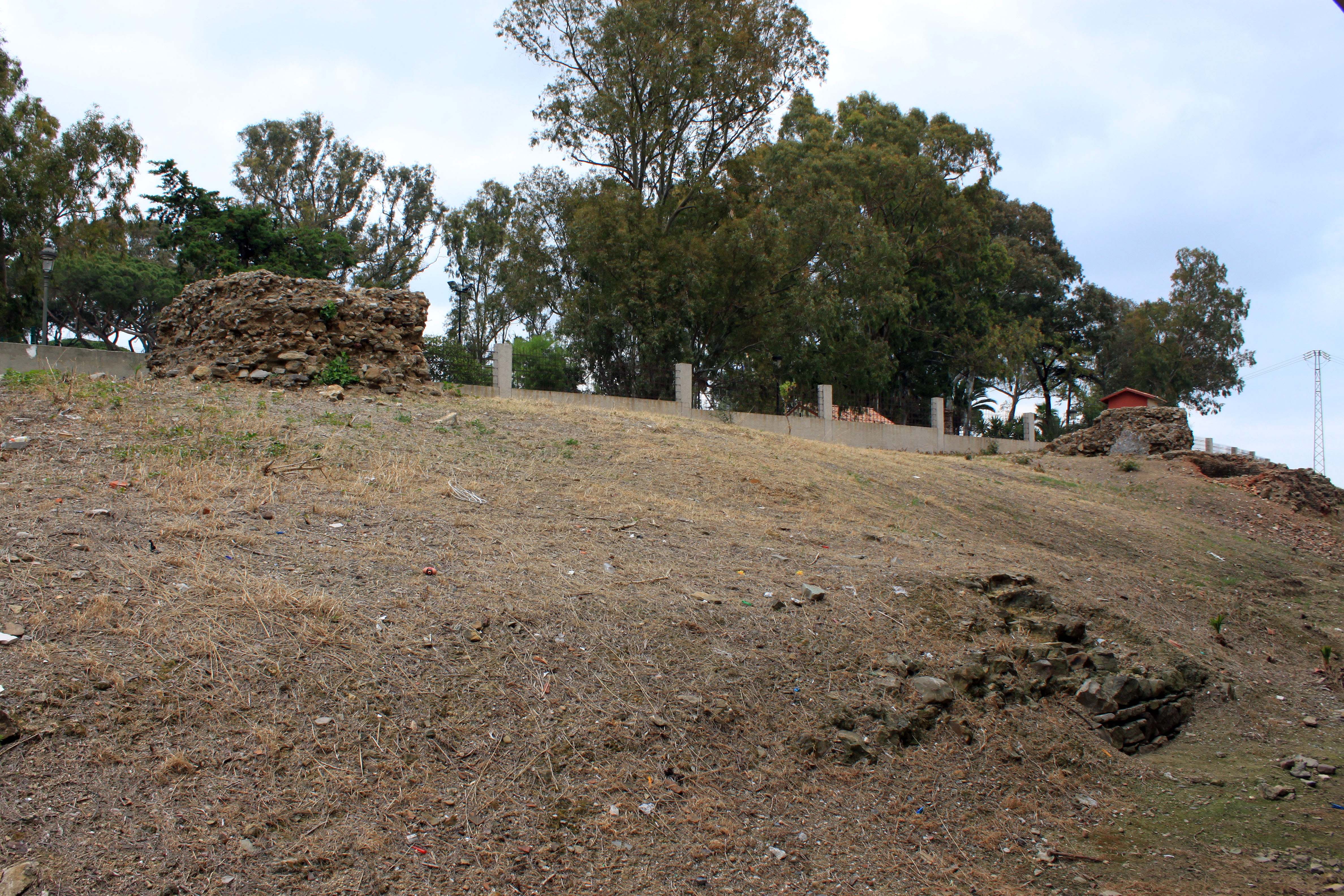 Huerta en Carmen de la localidad andaluza de Algeciras. En primer plano restos de la barbacana o foso, detrás a la izquierda la denominada Torre 1 y a la derecha la Torre 2 y del horno alfarero del siglo XVIII adosado a ella.